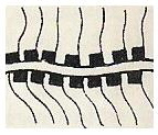 uklad zabudowy wsi w formie tzw. łacuchówki niemieckiej, Marek Silarski